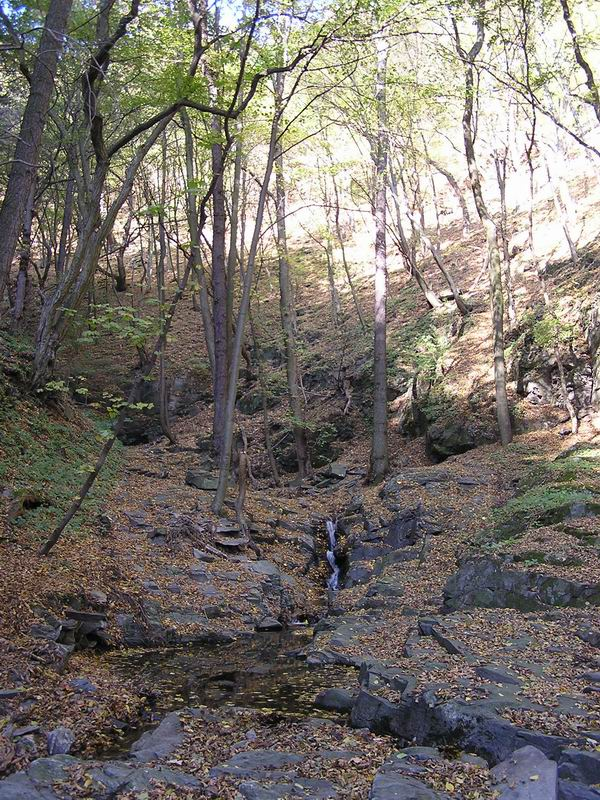 Přírodní rezervace Krašov.